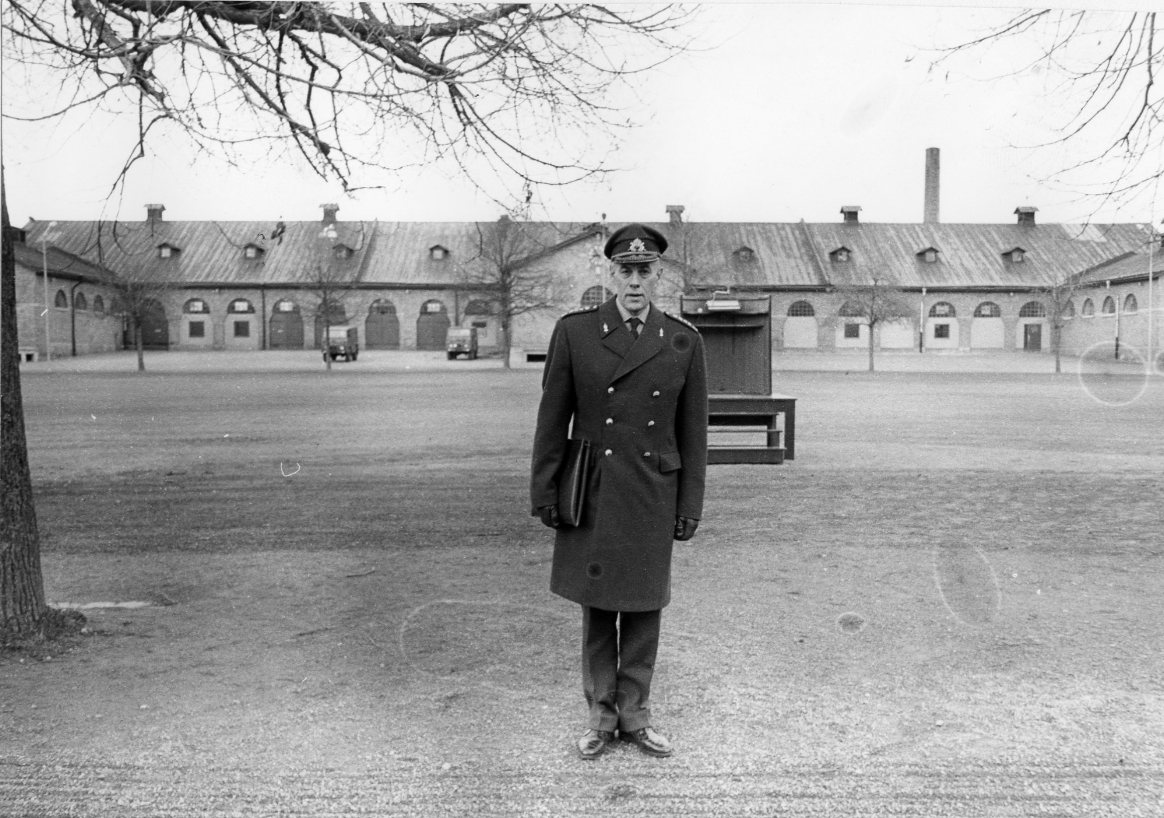 Gärdin, Gösta. Överste, A 6. Regementets dag.